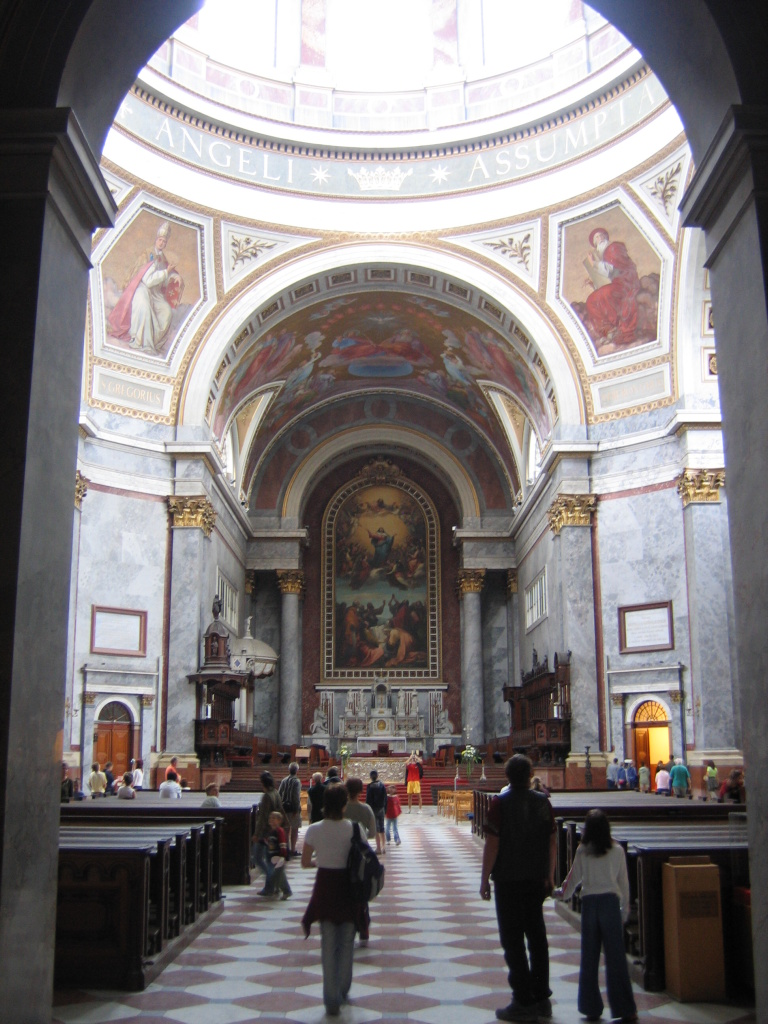 Návštěvníci baziliky mají možnost prožít hluboký zážitek.